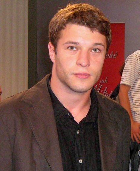 Maciej Brzoska - polski aktor